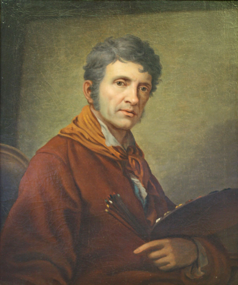 Johann Baptist Lampi der Ältere (1751–1830): Selbstporträt, 1808/10 (Tiroler Landesmuseum Ferdinandeum, Innsbruck).